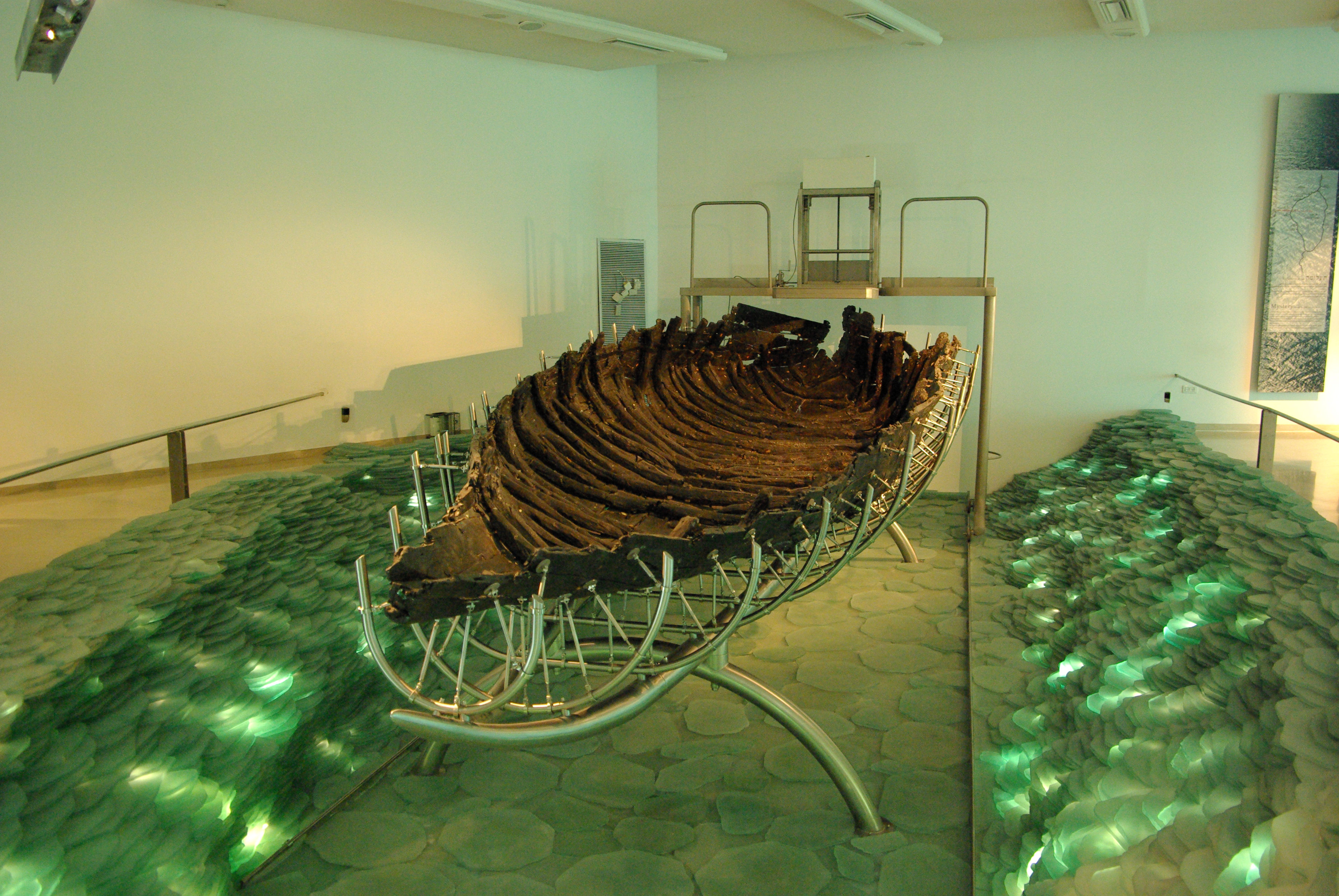 Kibbuz Ginnossar, Yigal Allon Center